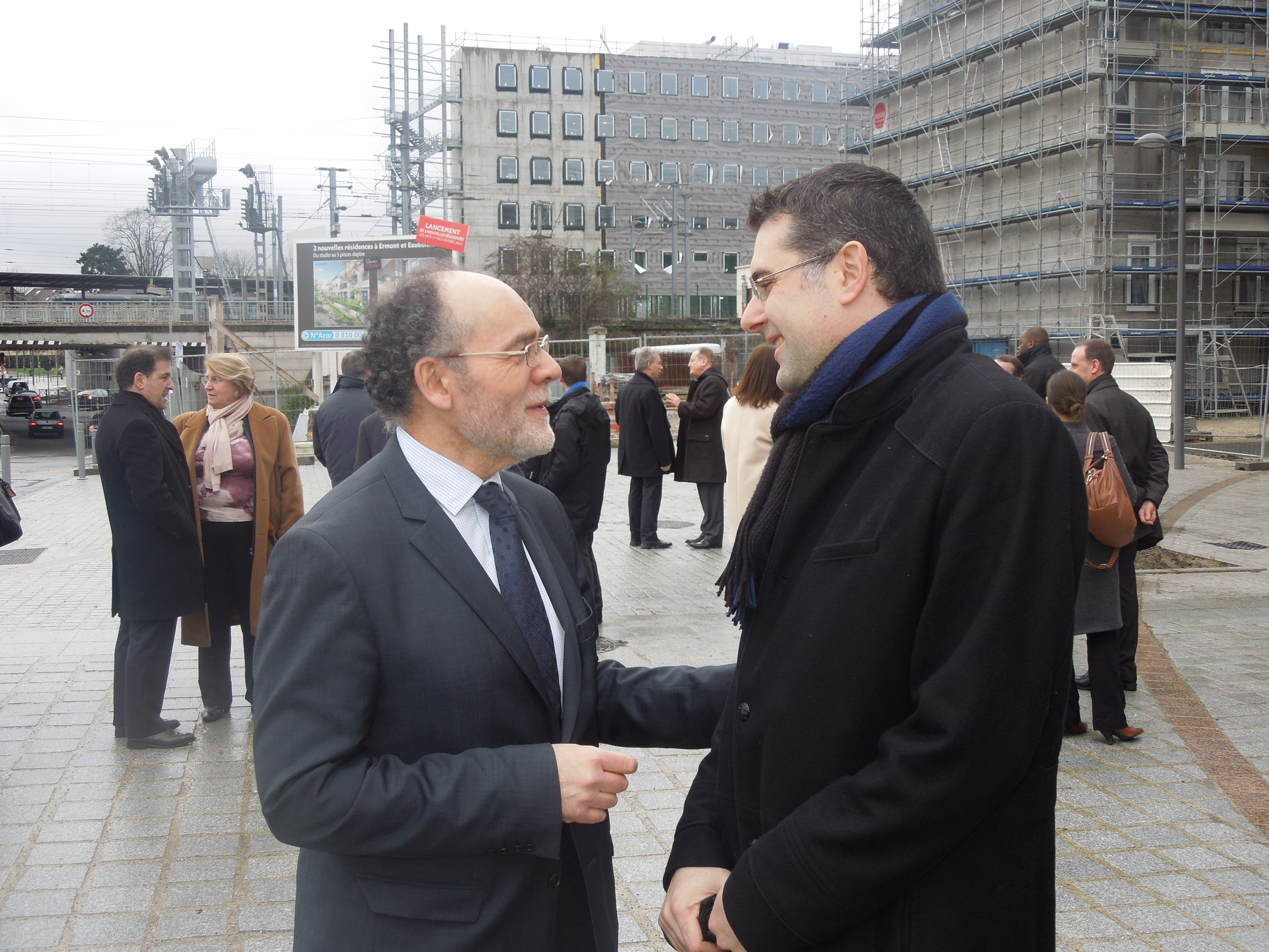 Gérard Sebaoun, député du Val d'Oise, et son suppléant, Mathias Trogrlic, conseiller municipal d'Ermont. Le 1er février 2013 à Ermont.